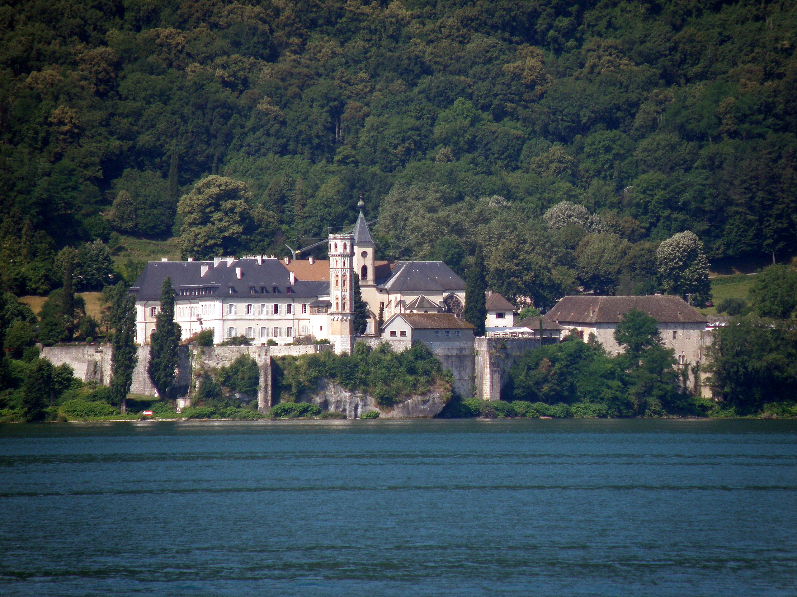 Saint-Pierre-de-Curtille, comm. du département de la Savoie (région Rhône-Alpes, France), sur la rive occidentale du lac du Bourget. Abbaye Notre-Dame-d’Hautecombe, telle qu’on l’aperçoit depuis la rive opposée (oriëntale) du lac, aux environs de la localité de Brison-les-Oliviers. Nous regardons vers l’ouest.